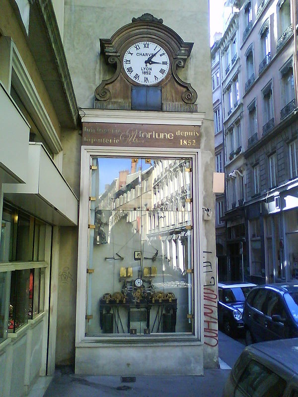 48, A Lyon, rue de la Poulaillerie : depuis 1884, l'Horloge Charvet donne l'heure, en présence de Guignol, Gnafron, Polichinelle et Harlequin. Fondée en 1852, horloger officiel de la Ville, la maison Charvet a disparu et remplacée par l'horloger Adrien Fortune. Quant à l'horloge, elle fût électrifiée en 1987...